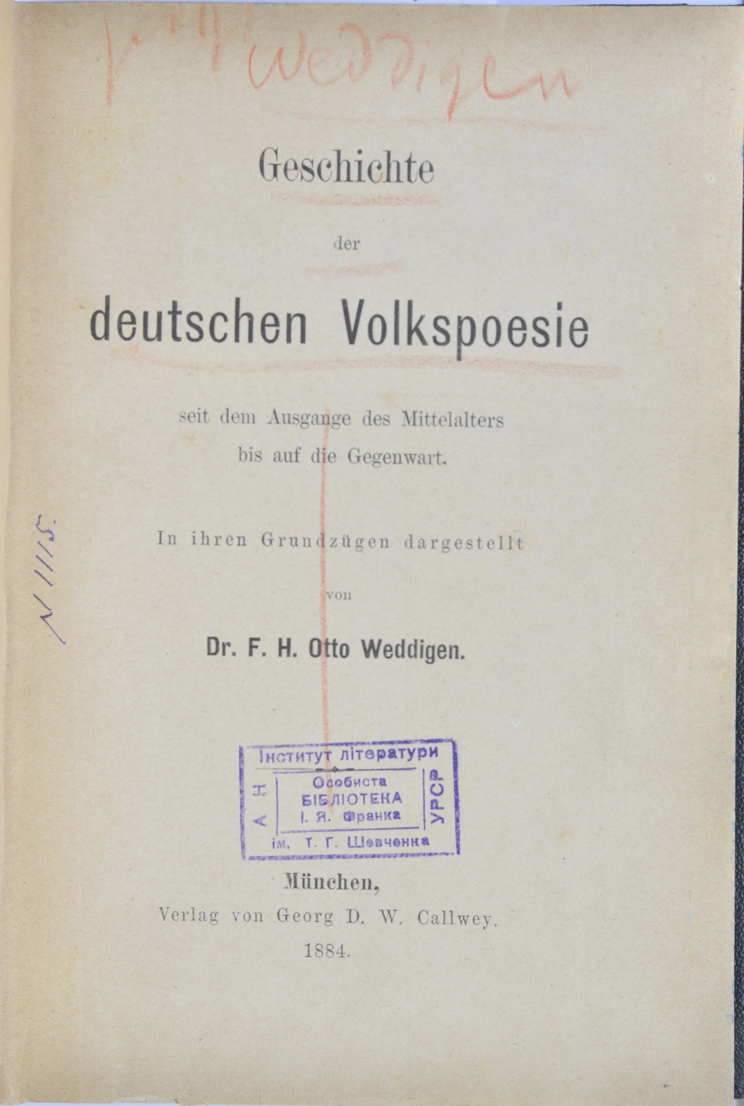 Friedrich Heinrich Otto Weddigen. Iсторія німецької народної поезії з середньовіччя й донині. Мюнхен, 1884. Титульний аркуш. З особистої бібліотеки І.Франка